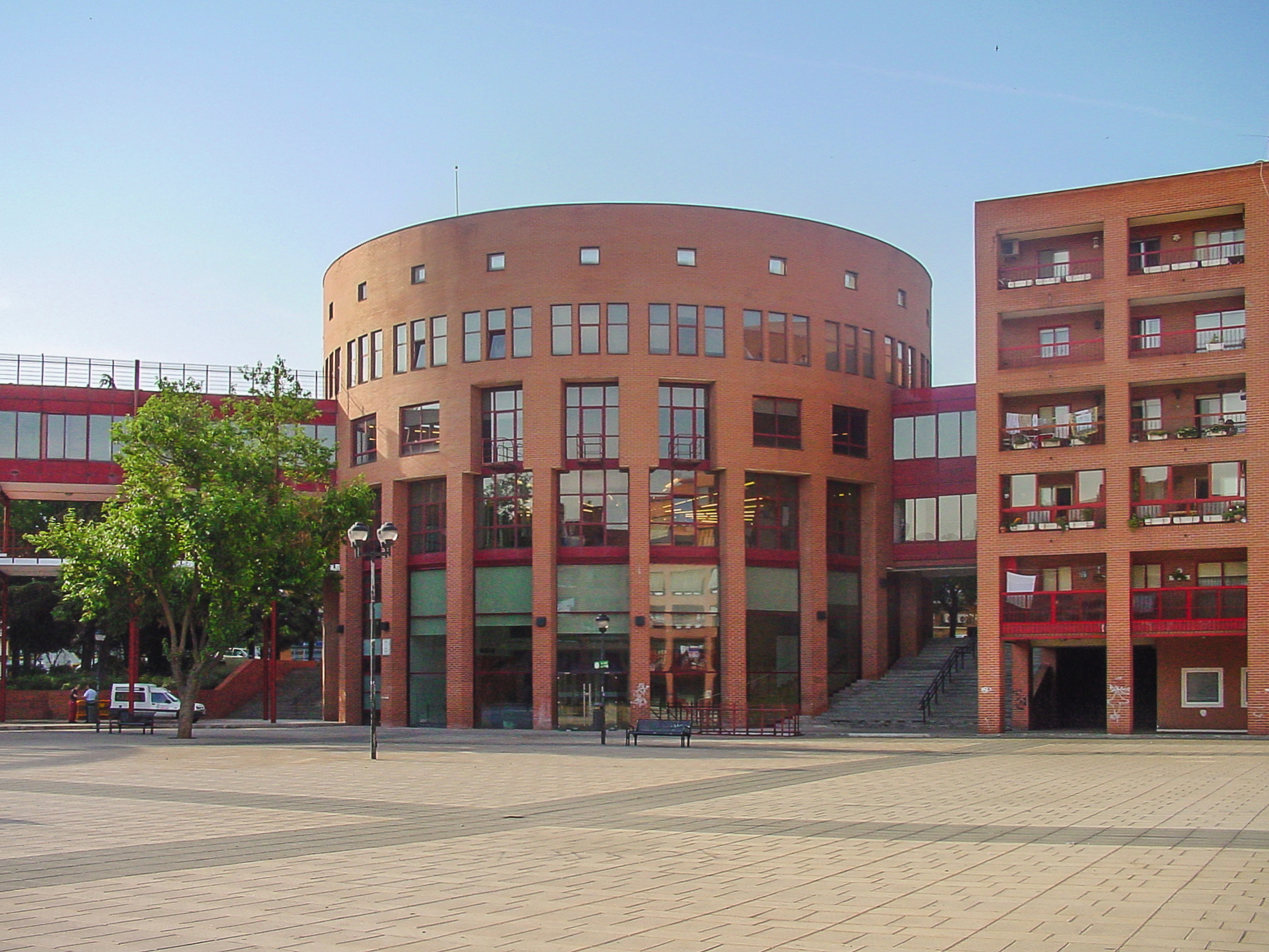 Ayuntamiento de Coslada.